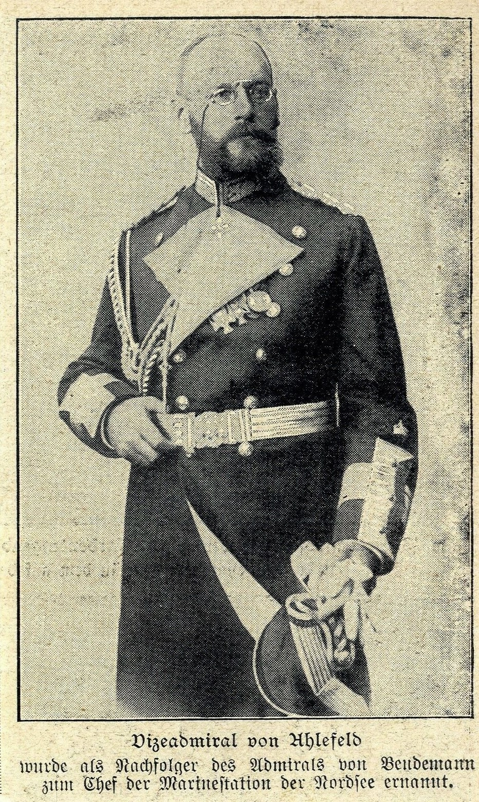 Vizeadmiral Hunold von Ahlefeld zum Chef der Marinestation der Nordsee ernannt, 1907